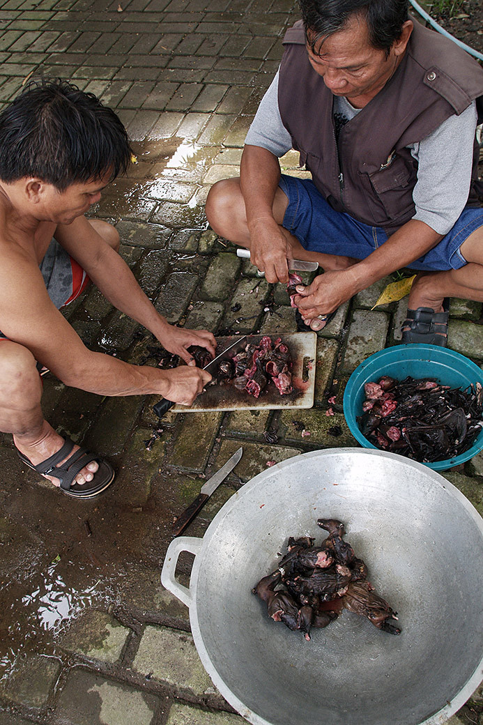 食用コウモリの調理中